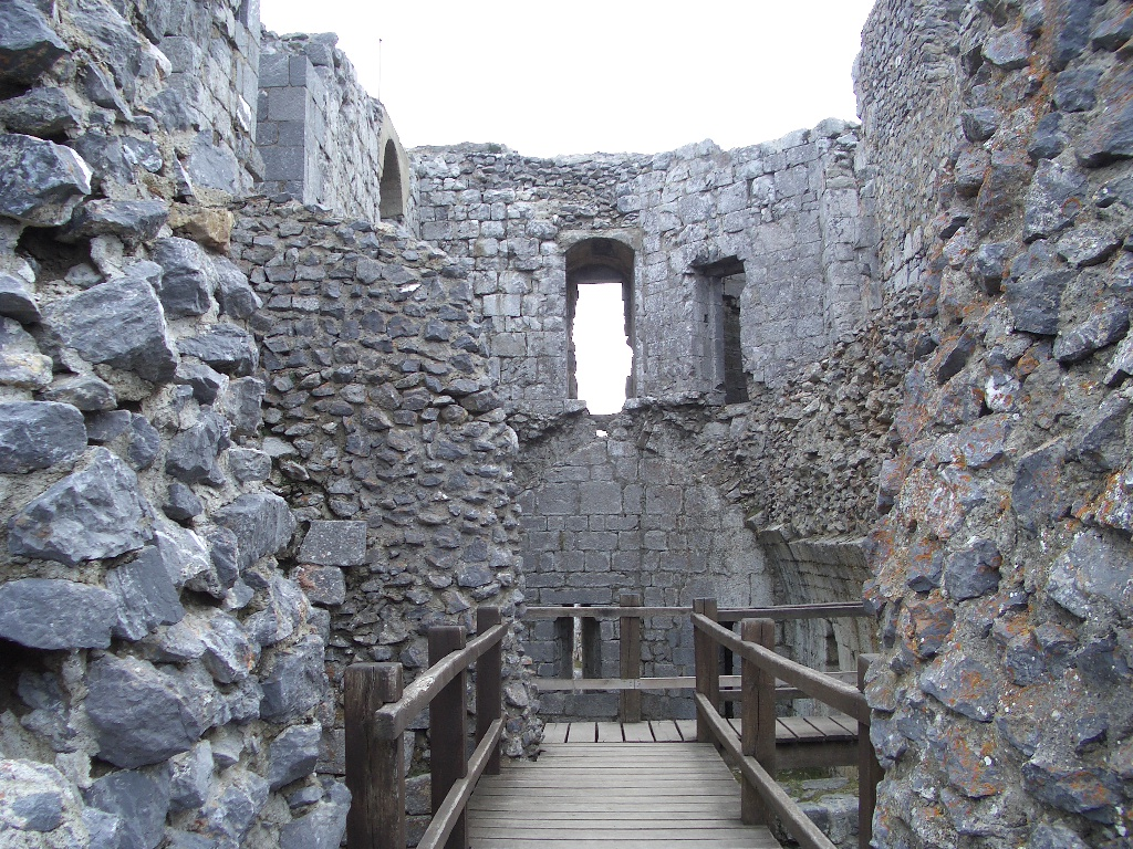 Die Katharerfestung Montségur